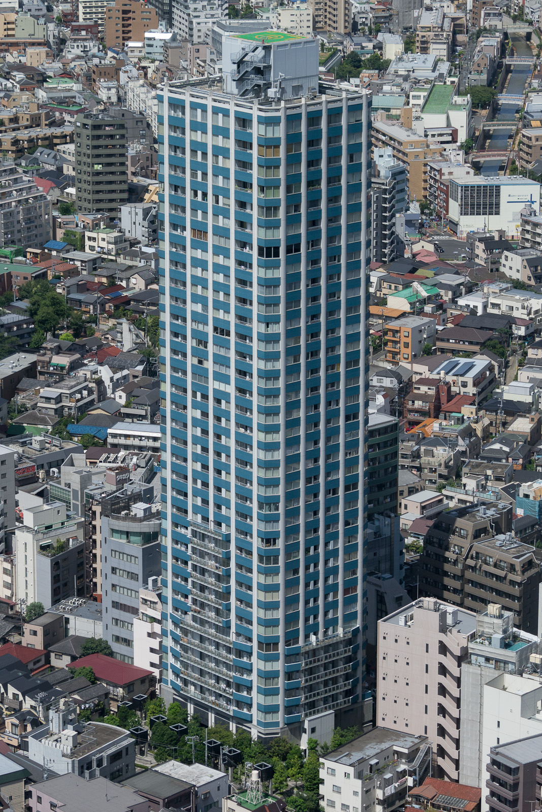 都庁展望室より見る「シティタワー新宿新都心」。